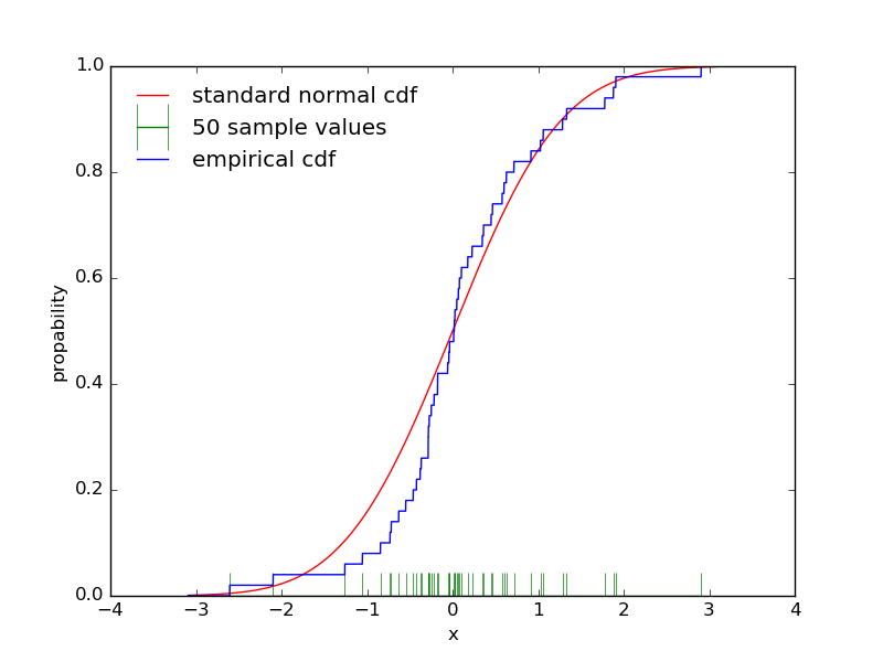 גרפים של פונקציית ההתפלגות המצטברת של התפלגות נורמלית סטנדרטי (אדום) וגרף ההתפלגות המצטברת האמפירית לפי מדגם עם 50 תצפיות (כחול) שמיקומיהן מצויינים בקווים ירוקים